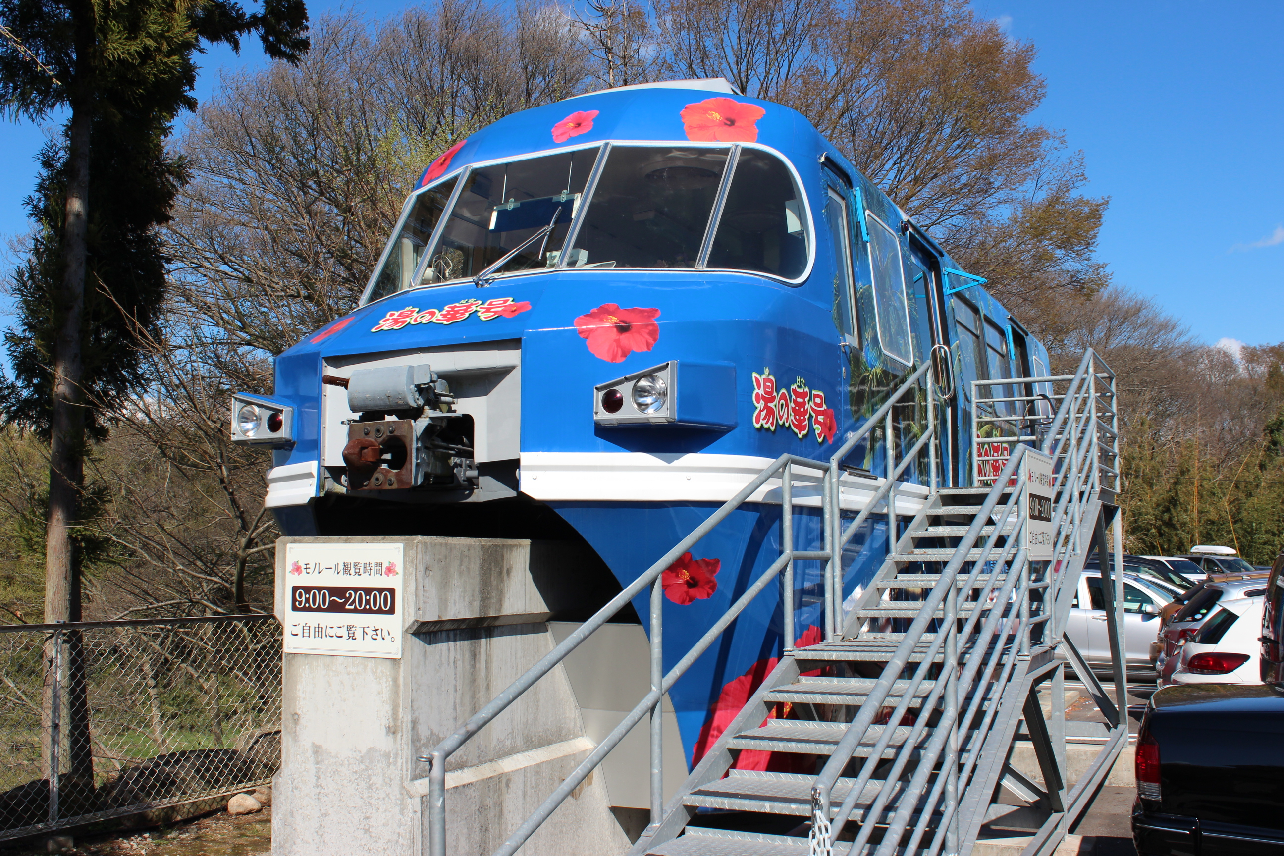 名鉄MRM100形電車103号車